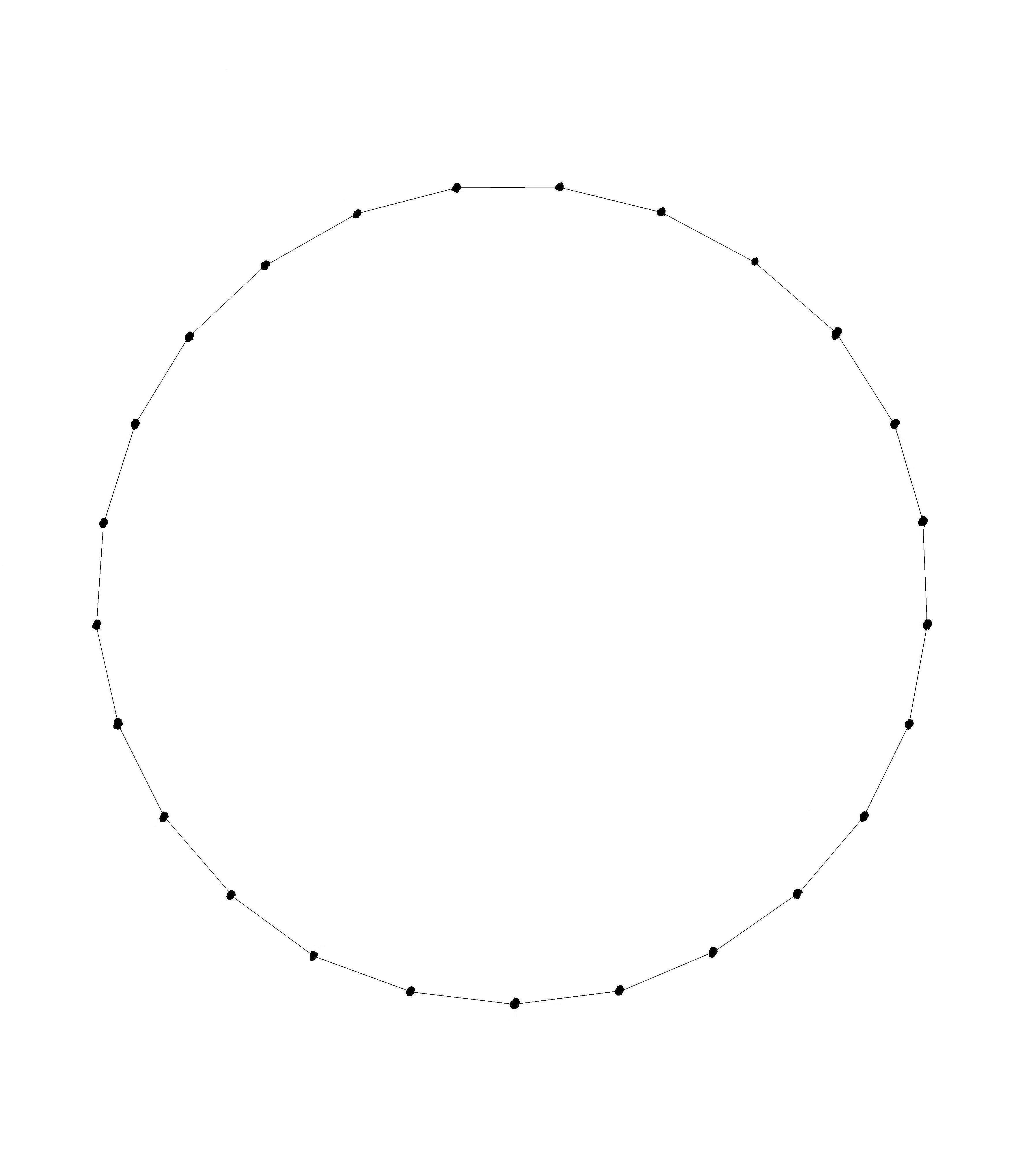 Polygone à 25 côtés